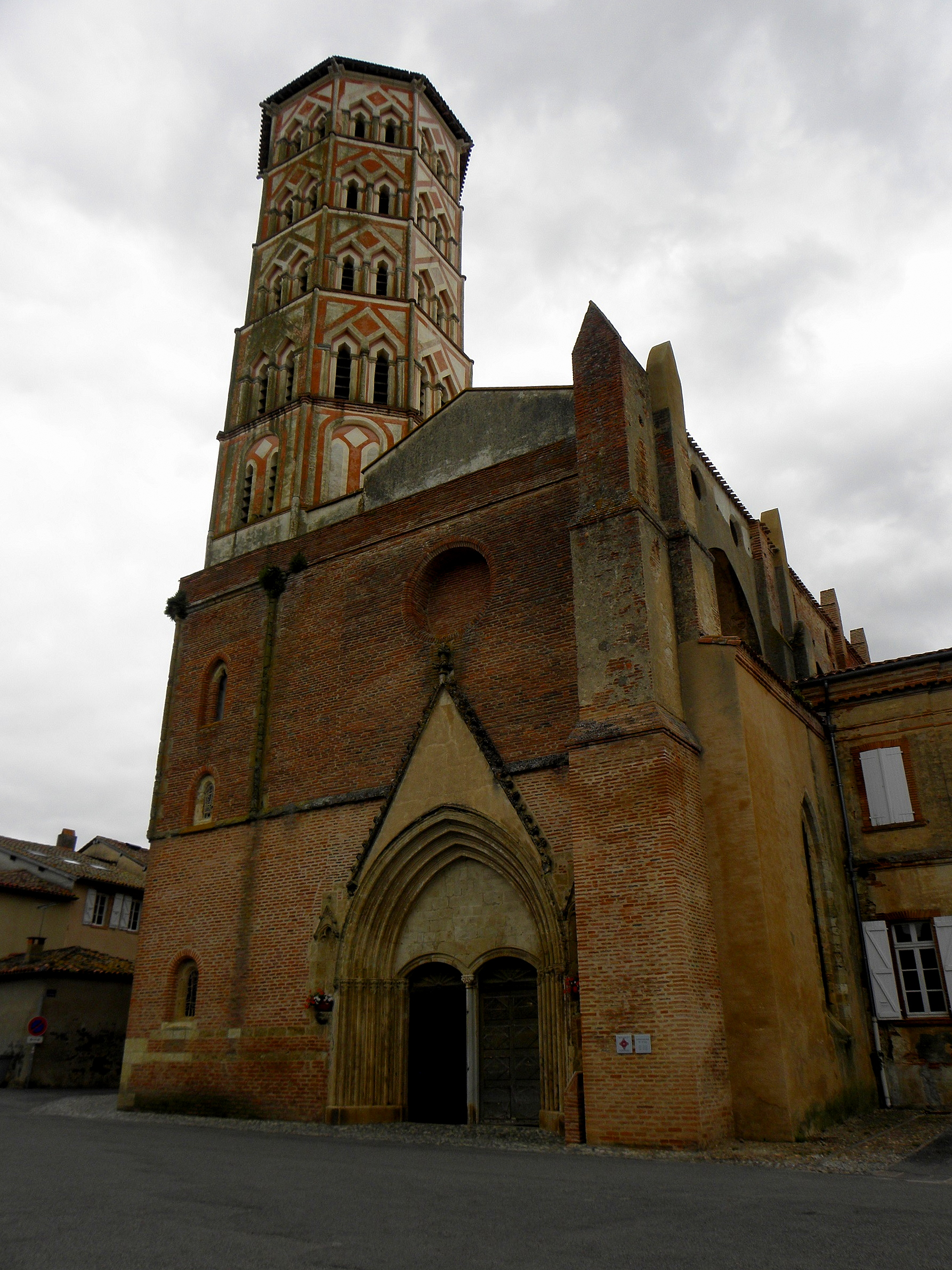 Cathédrale Sainte-Marie de Lombez (32). Façade occidentale.